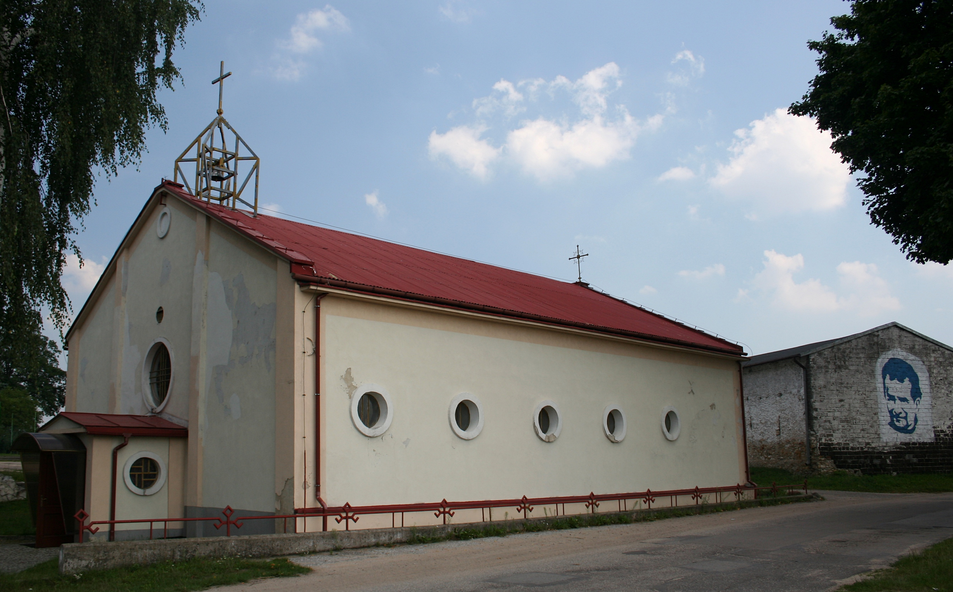 Ulica Salezjańska w Kopcu, gmina Kłobuck, woj. śląskie